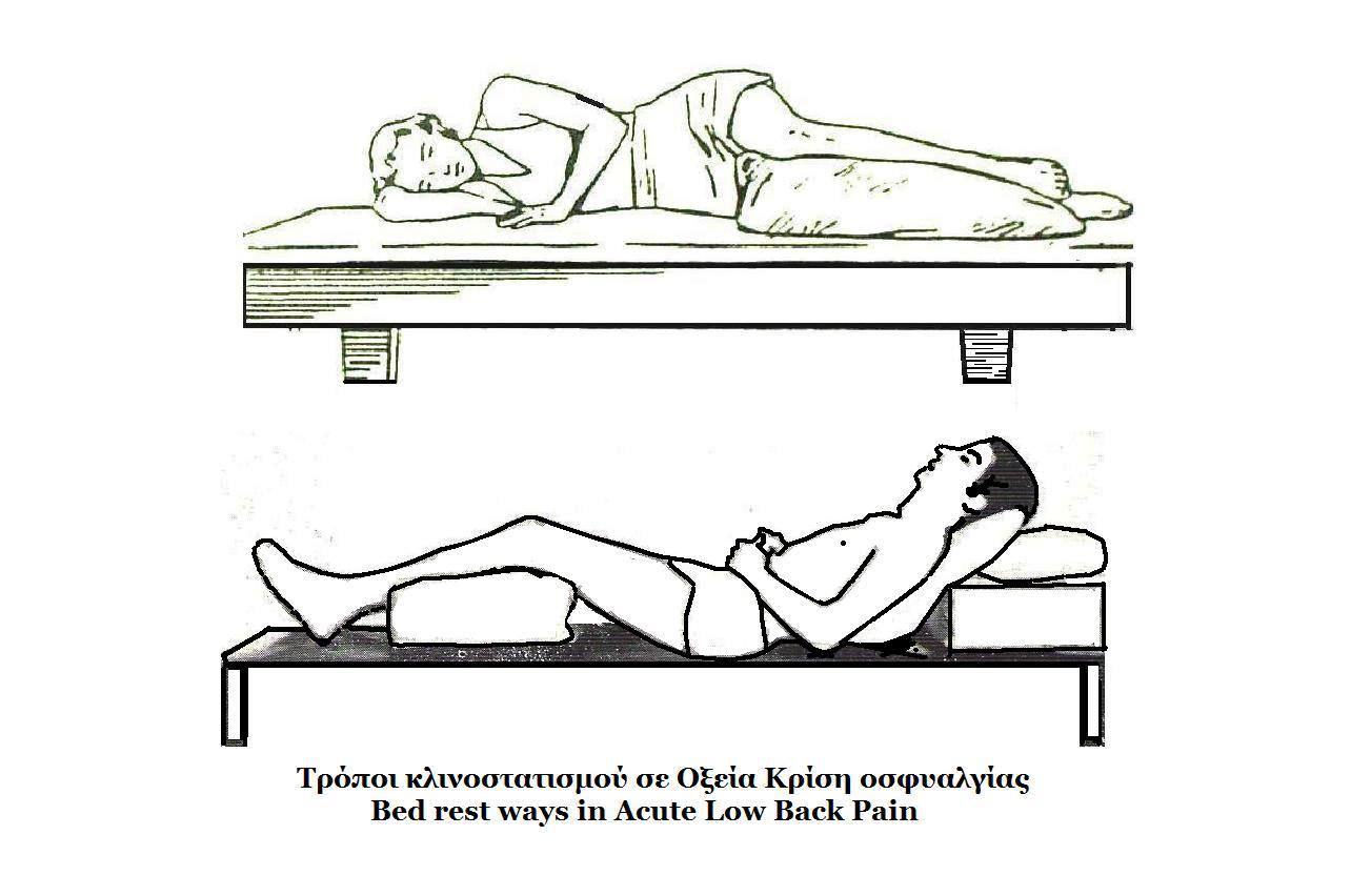 Τρόποι Κλινοστατισμού στην Οξεία Κρίση Οσφυαλγίας